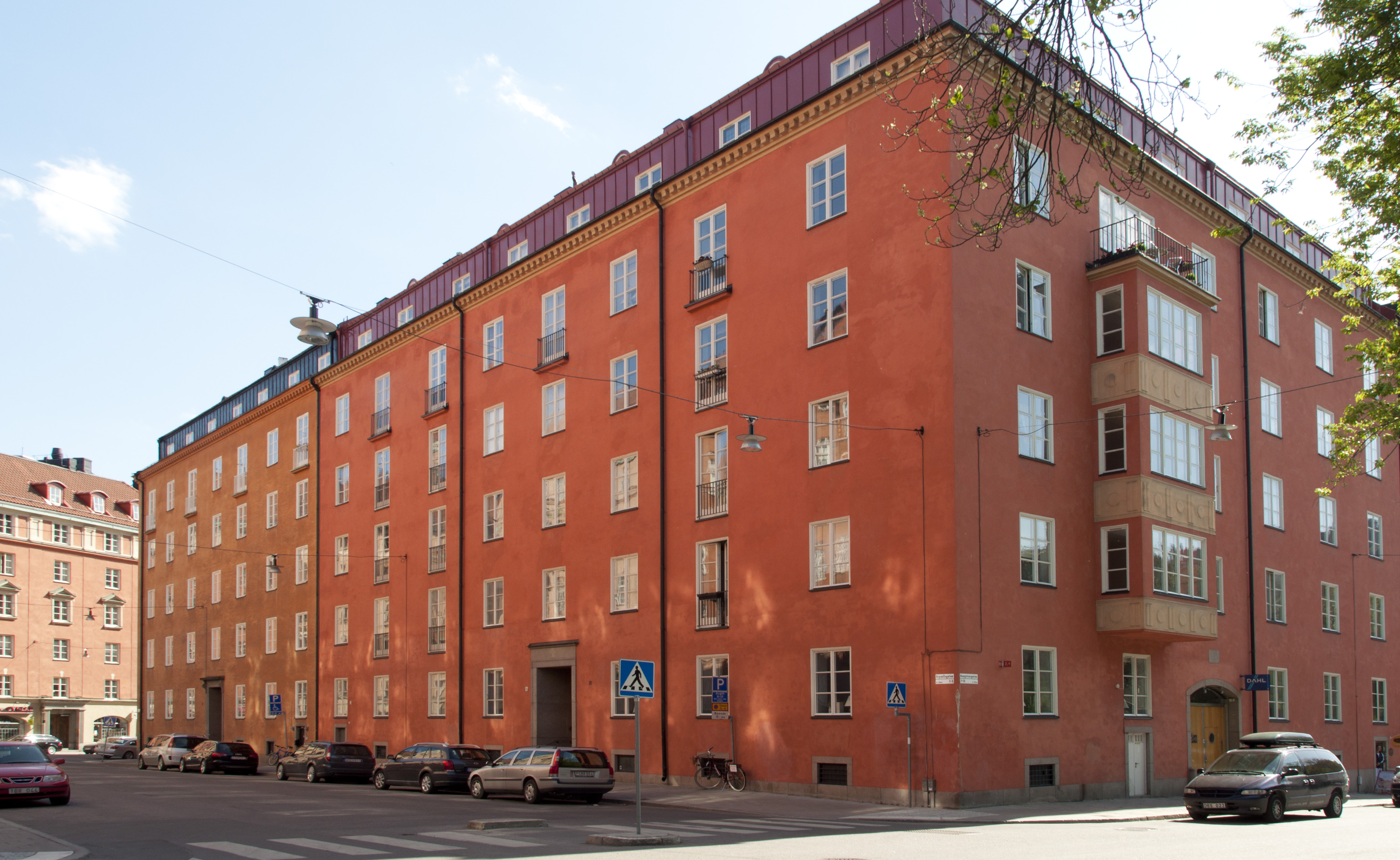 Sälgen 6 & 7, Kungstensgatan 7, Fryxellsgatan 1-3, Rådmansgatan 20, Byggnadsår 1926-27, arkitekt Birger Jonson, byggherre, byggmästare A Olsson.